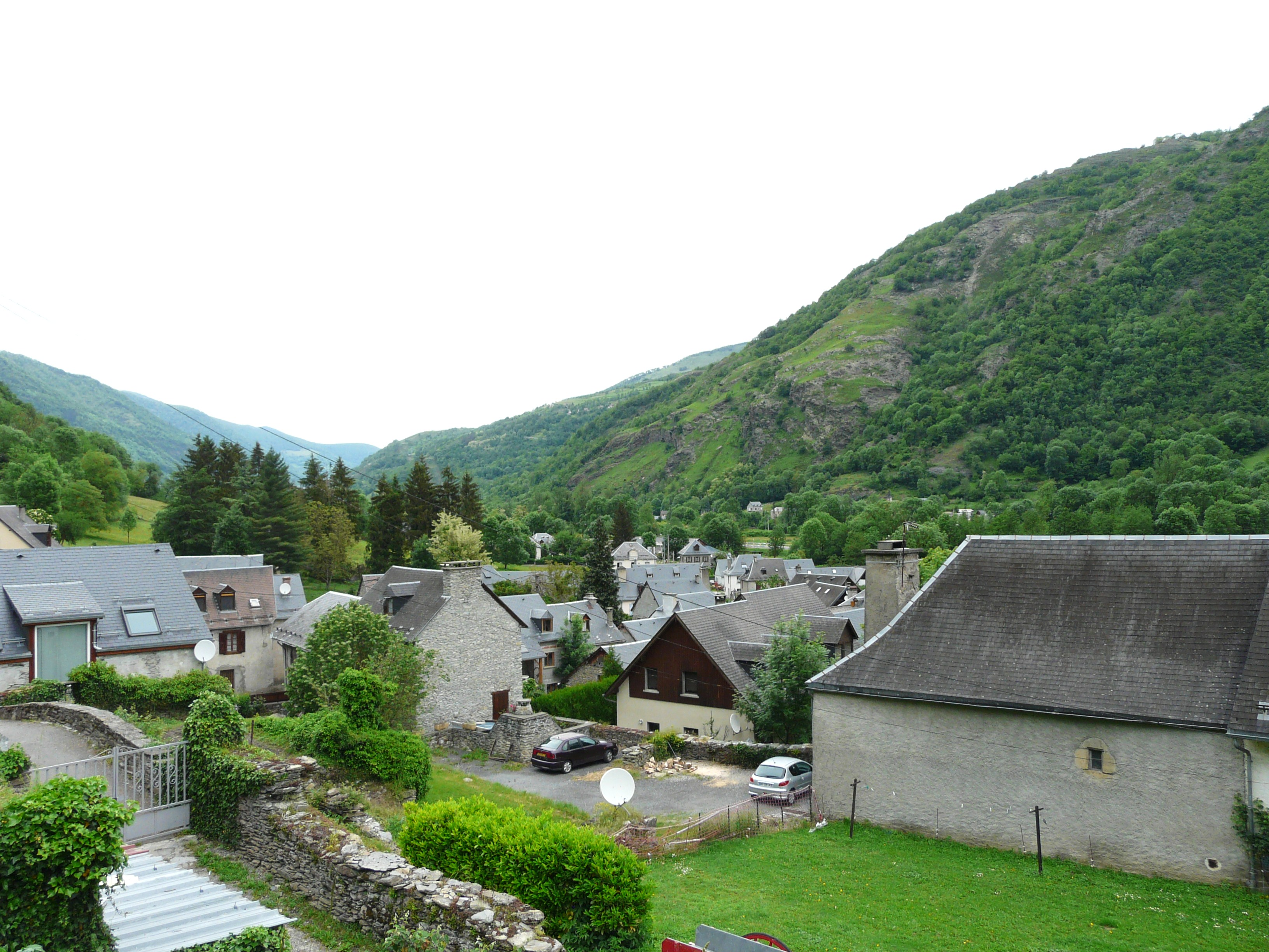 Le village d'Antignac, Haute-Garonne, France.